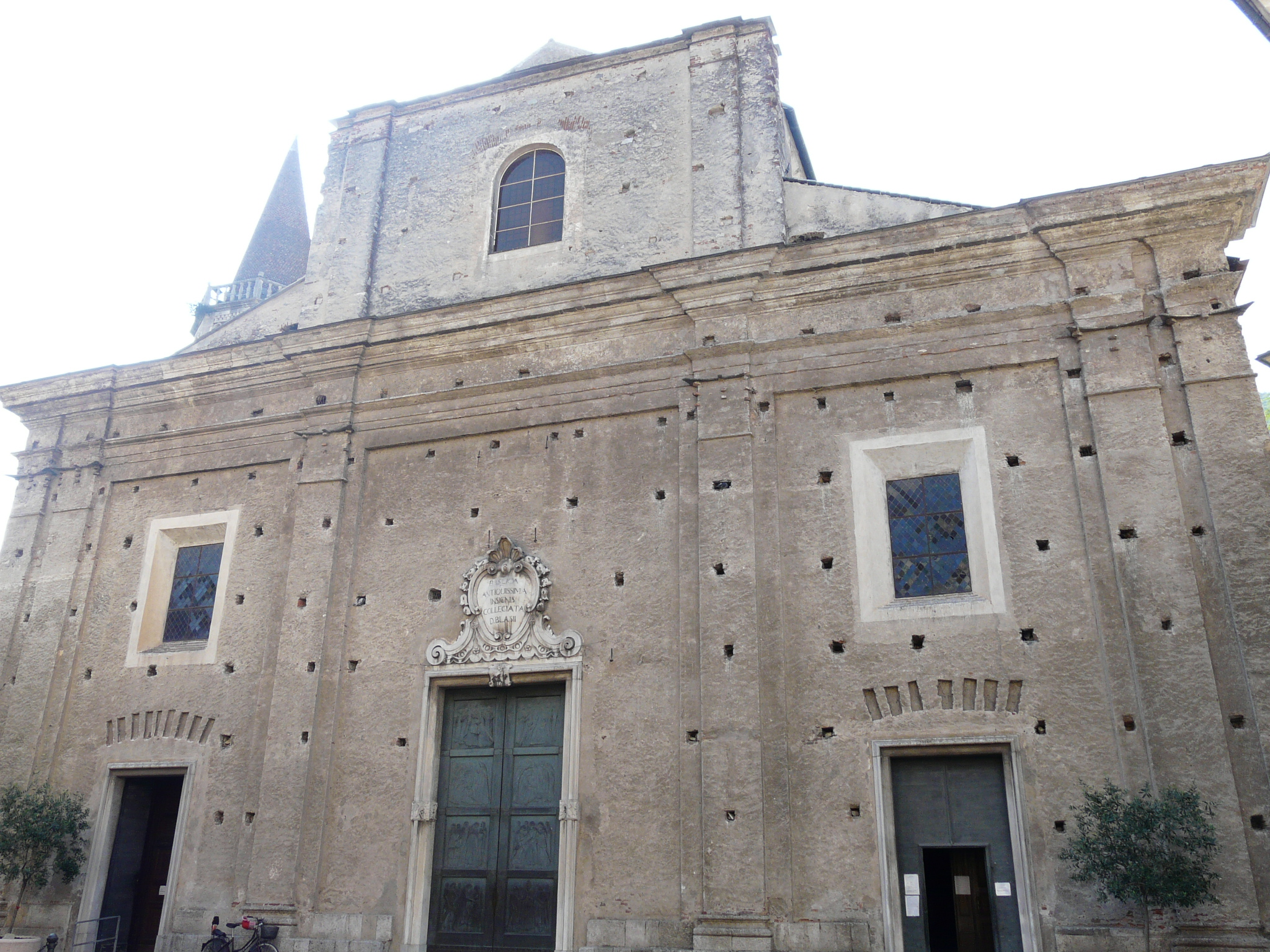 Chiesa di San Biagio, Finalborgo, Finale Ligure, Liguria, Italia